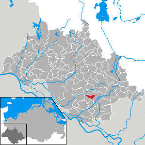 Bresegard bei Eldena in Mecklenburg-Vorpommern - district Ludwigslust